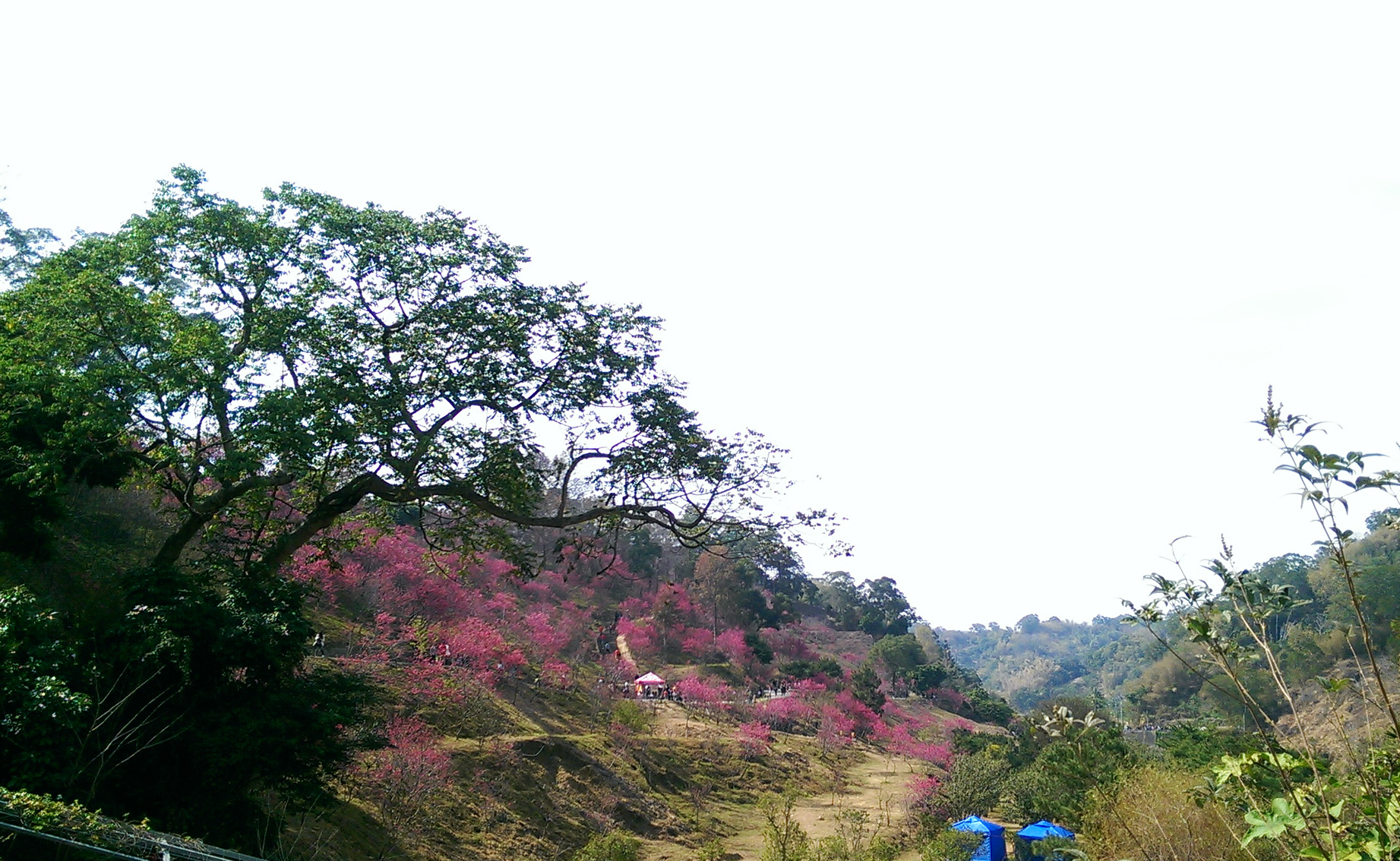 中文（台灣）: 台中大坑濁水巷櫻花林